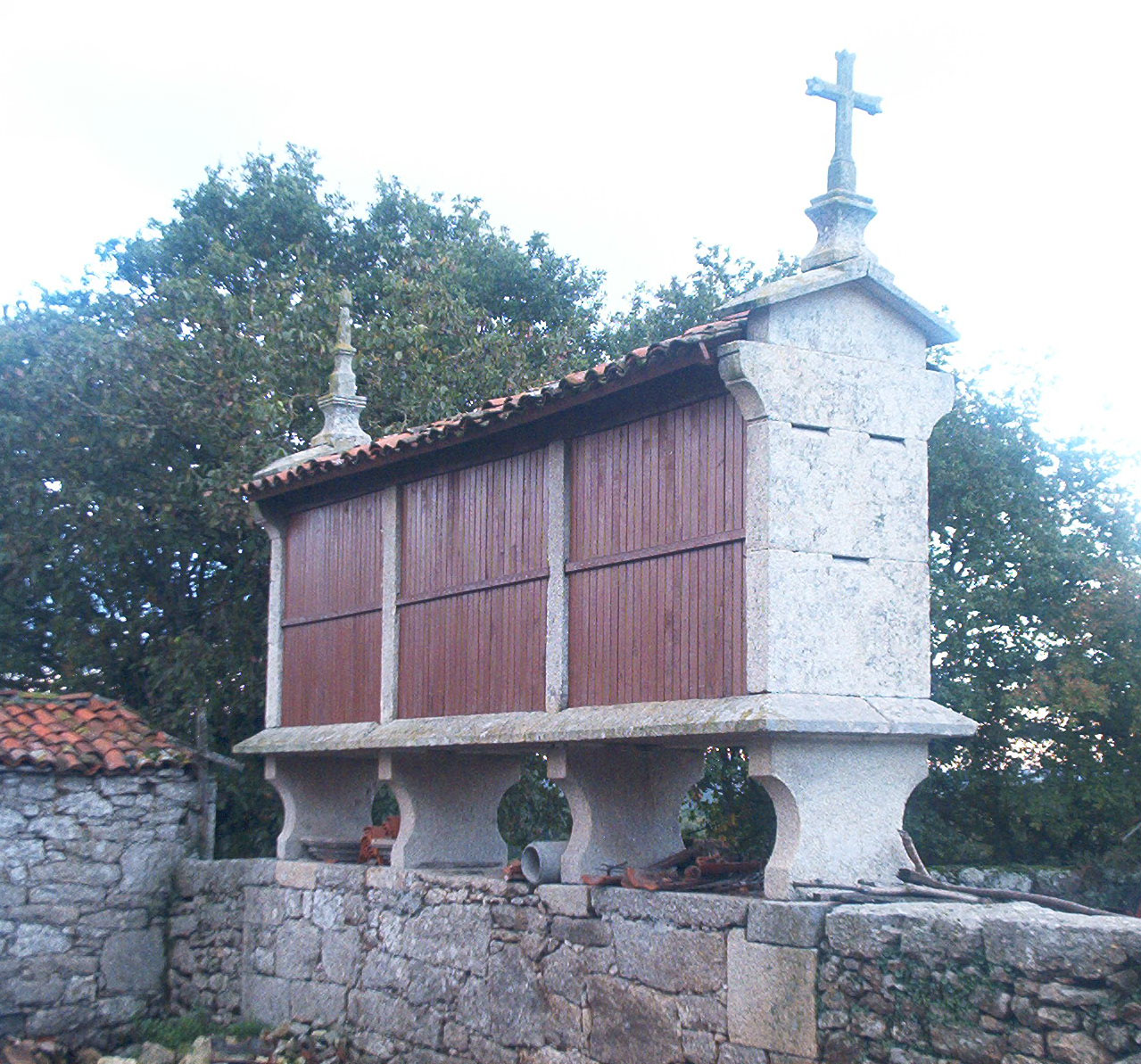 Hórreo de tipo mahía, de tres claros, erguido sobre o muro da propiedad, aireado con catro cepas copiformes dunha soa peza. Cuberto con tella do país e adornado con cruz latina e lampión fusiforme. Ubicado no lugar da Carreira, en San Martiño de Vilapoupre (Antas de Ulla)